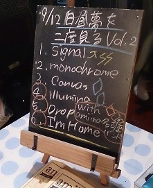 amiinaセトリボード(20150912(1))